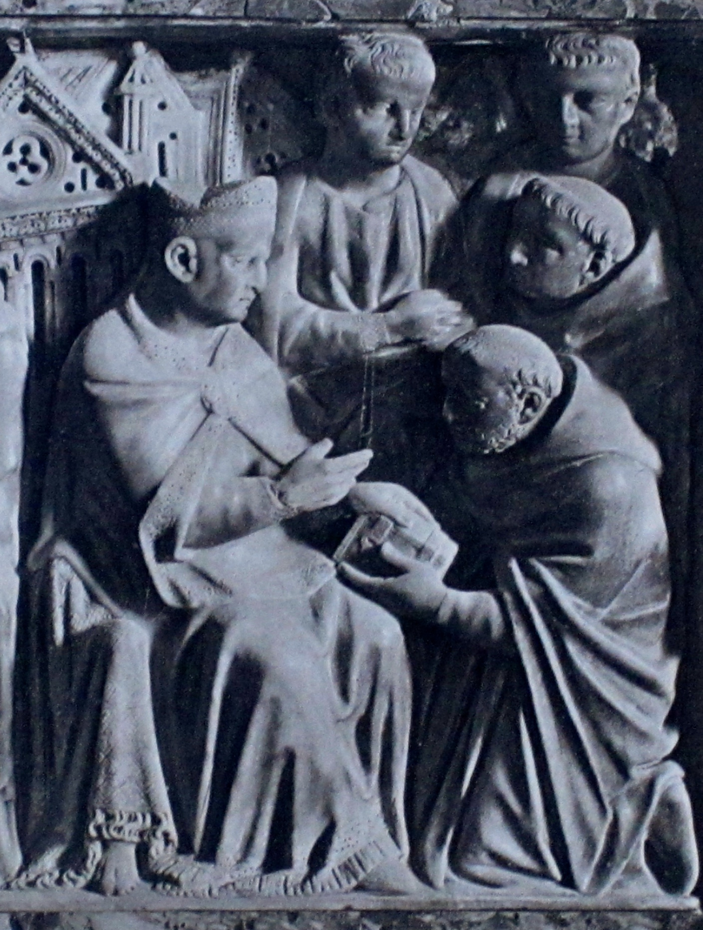 Approbation de l'ordre des prêcheurs par Innocent III. Détail.